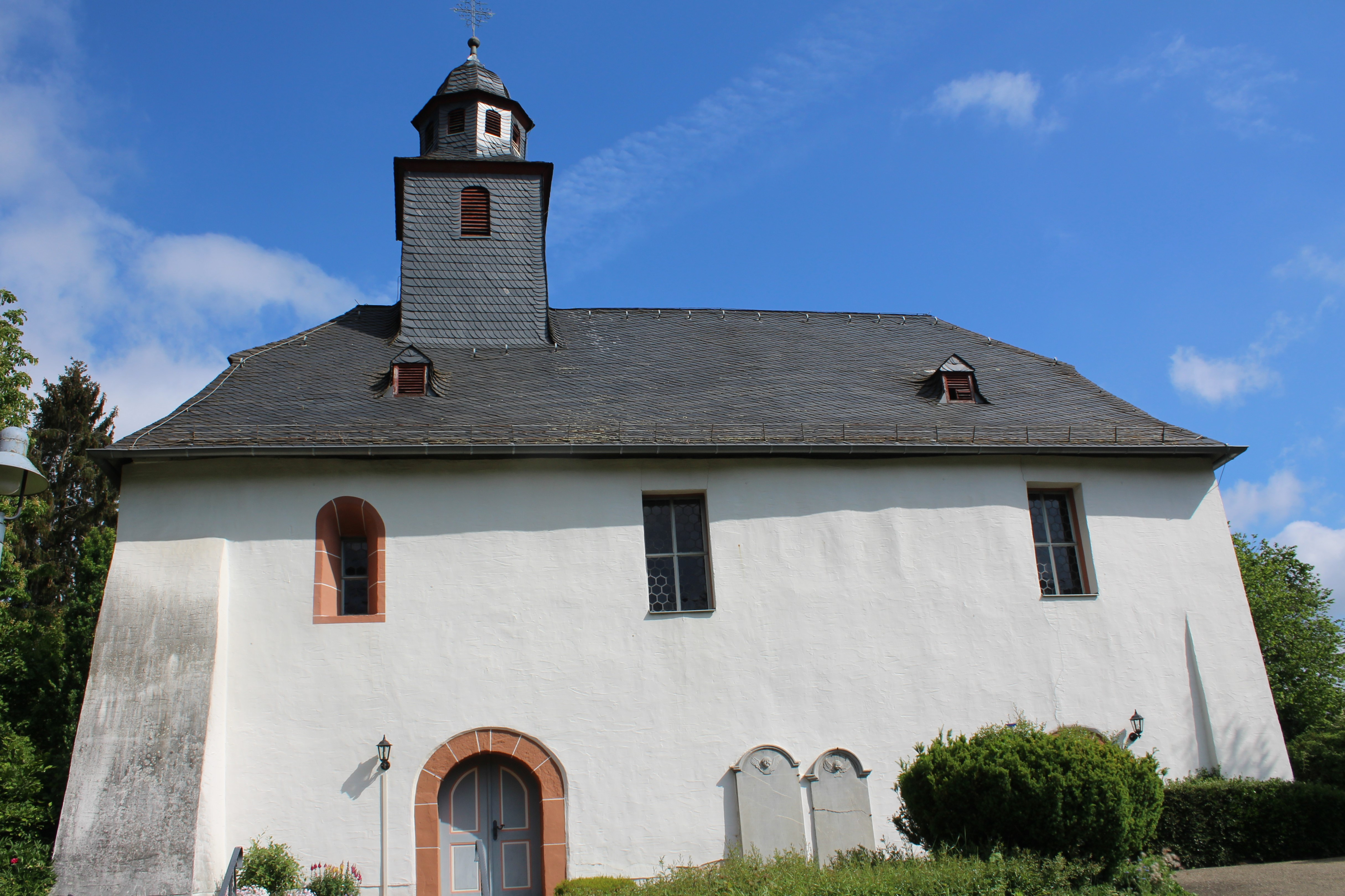 Ev. Kirche Nauborn, Wetzlar, Lahn-Dill-Kreis, Hessen, Deutschland